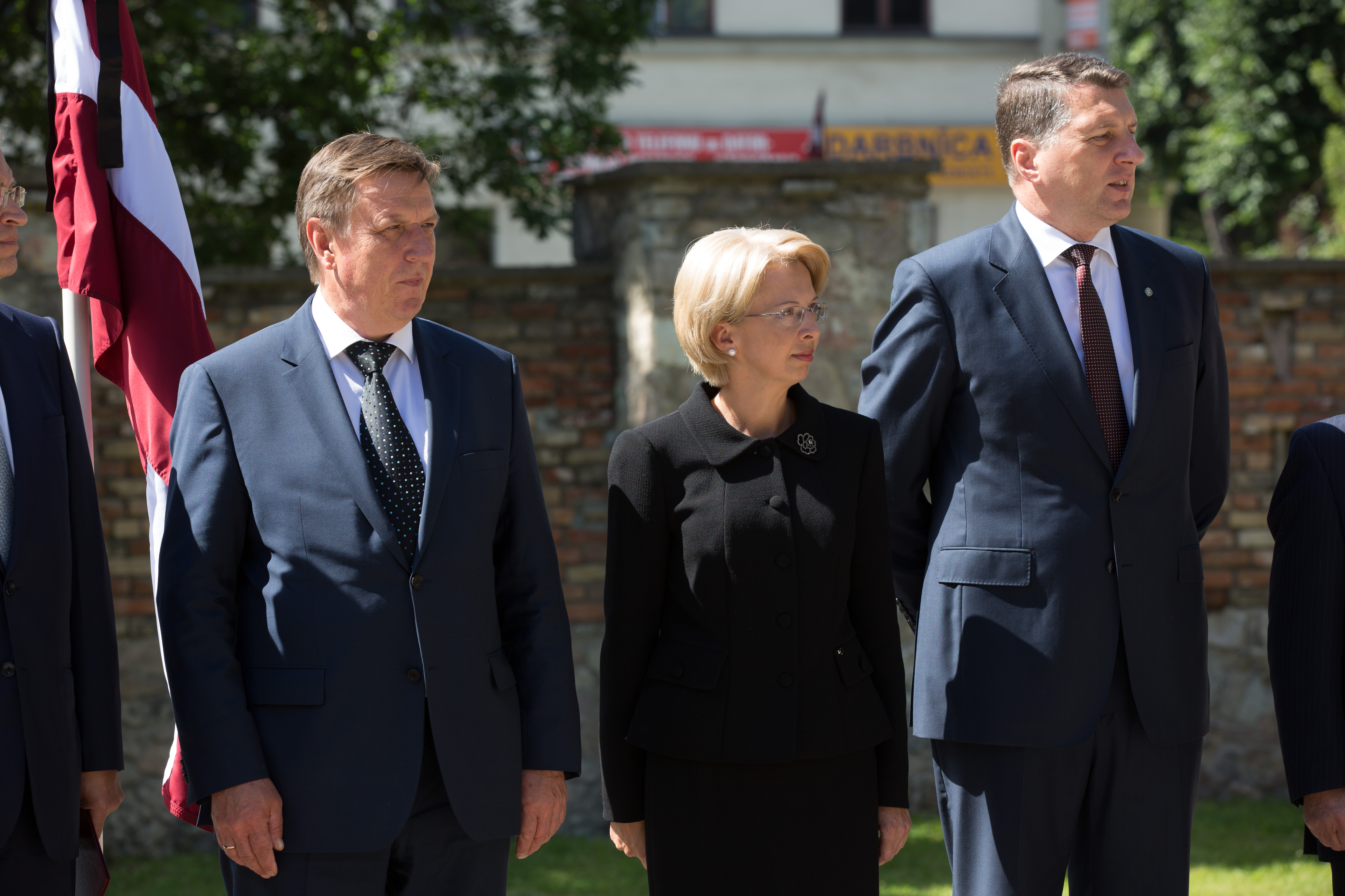 2016.gada 4.jūlijs. Saeimas priekšsēdētāja Ināra Mūrniece piedalās Ebreju tautas genocīda upuru piemiņas dienas pasākumā. Foto: Ernests Dinka, Saeimas Administrācija Izmantošanas noteikumi: saeima.lv/lv/autortiesibas